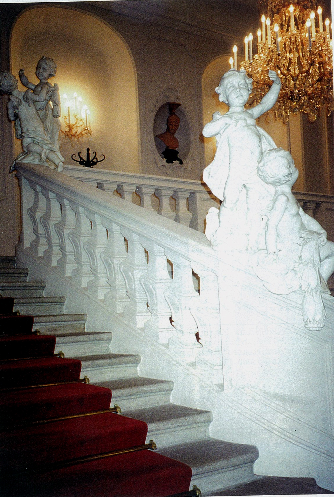 Erzbischöfl._Palais_Treppe